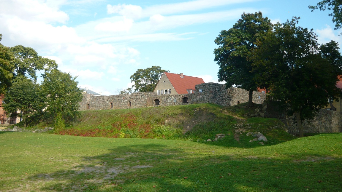 zamek z fosami i otoczeniem Szczytno, ul. Sienkiewicza 1, Szczytno (gmina miejska)